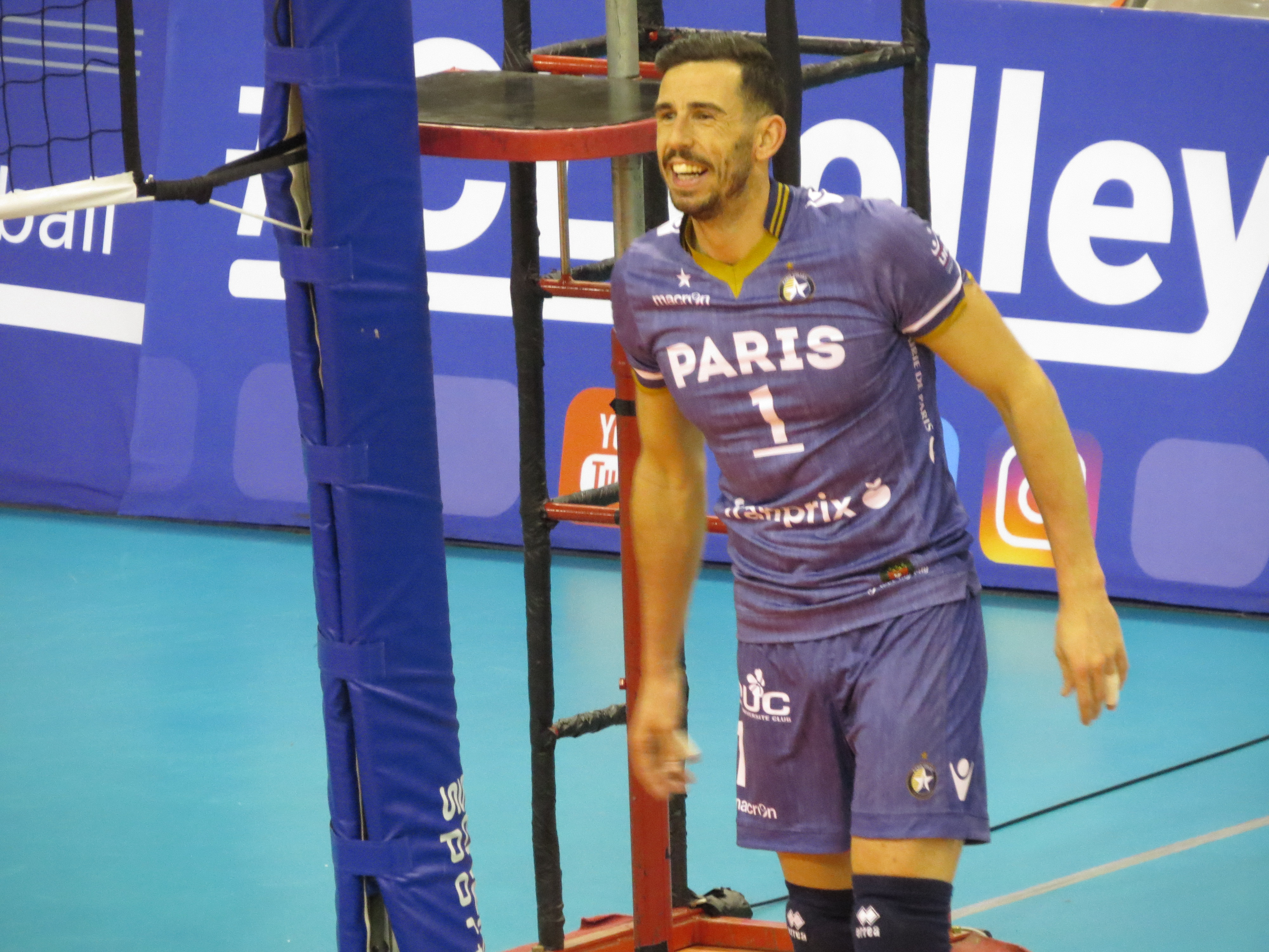 Photo réalisée lors du match de ligue des champions de volley entre le Paris Volley et Zenith Kazan 1 ARAUJO PINHEIRO Nuno Miguel